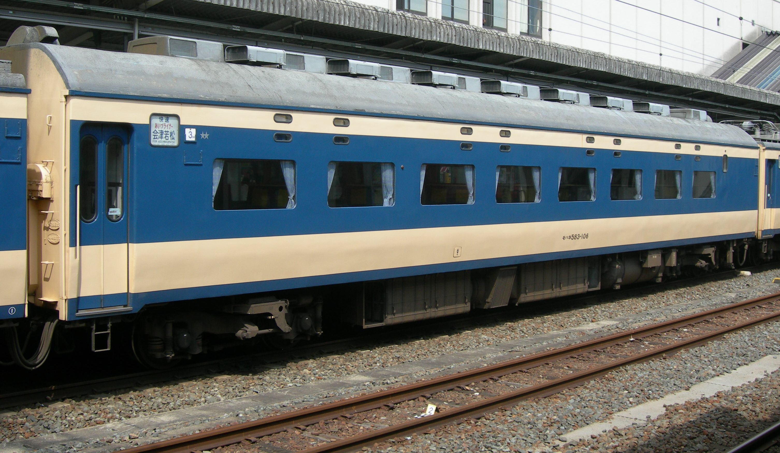 583系電車 モハネ583-106